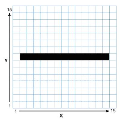 Võrrandi abil joonestatud joon.